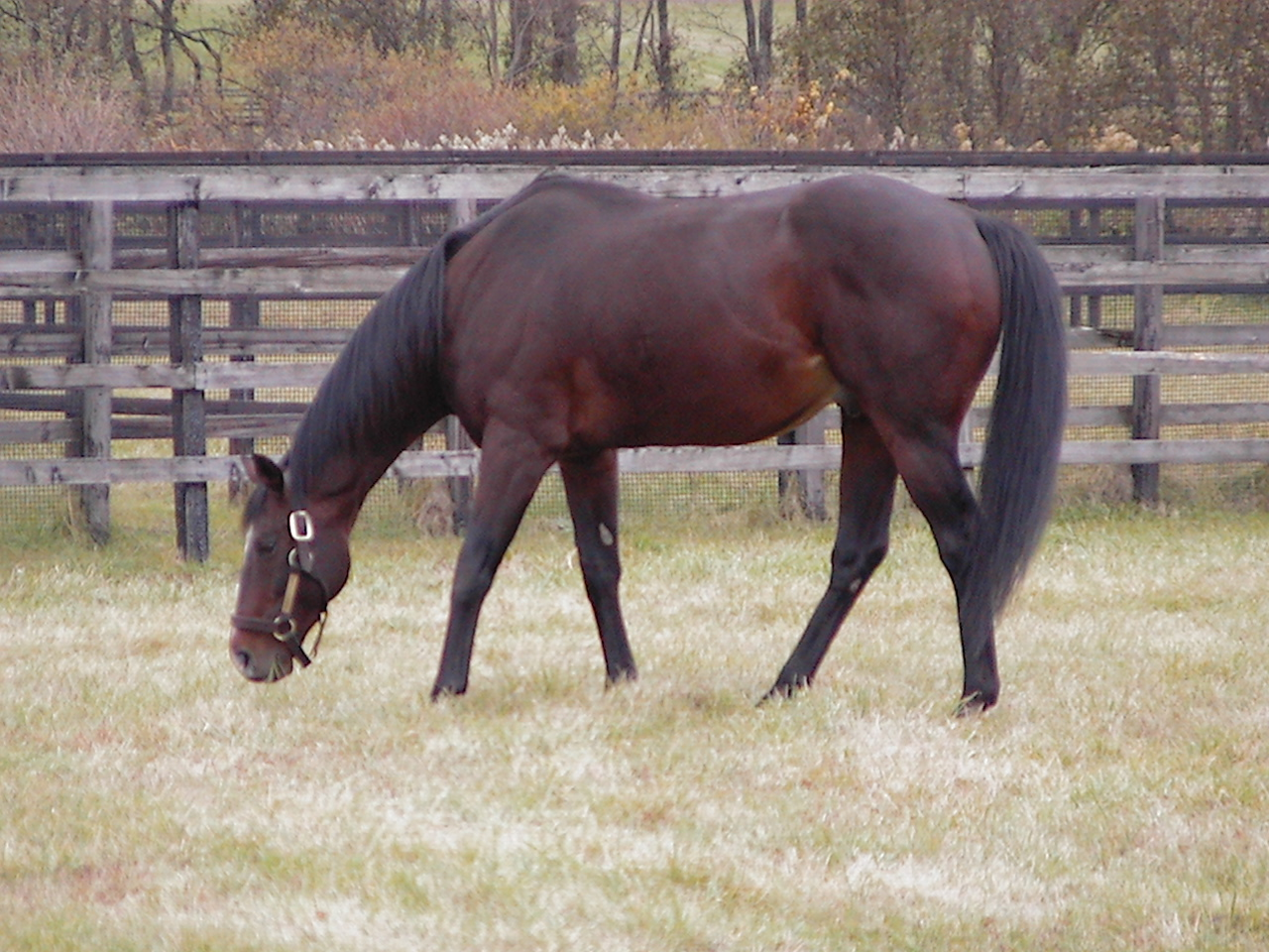 ブリーダーズ・スタリオン・ステーションの牧場見学にて撮影 バブルガムフェロー